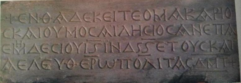 כתובת נוצרית שנמצאה בבאר שבע